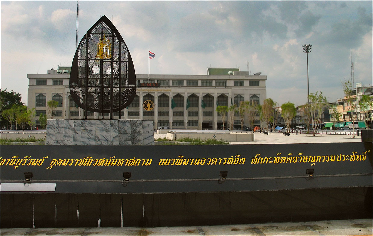 Bangkok's old name, monument in font of Bangkok Metropolitan Administration BMA (de: Alter Name von Bangkok, Monument vor der Bangkok-Stadtverwaltung) Lizenz/Quelle: H. Damm Juni 2003